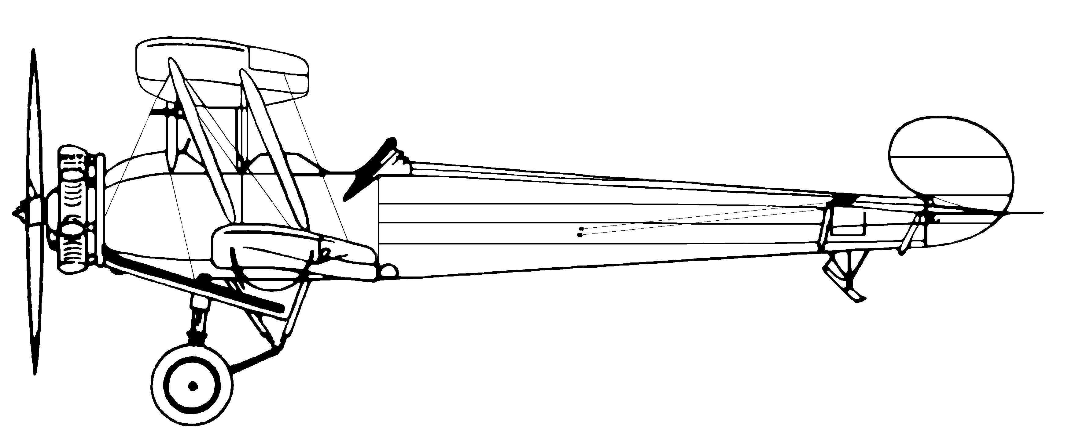 Avro 504N, left side drawing